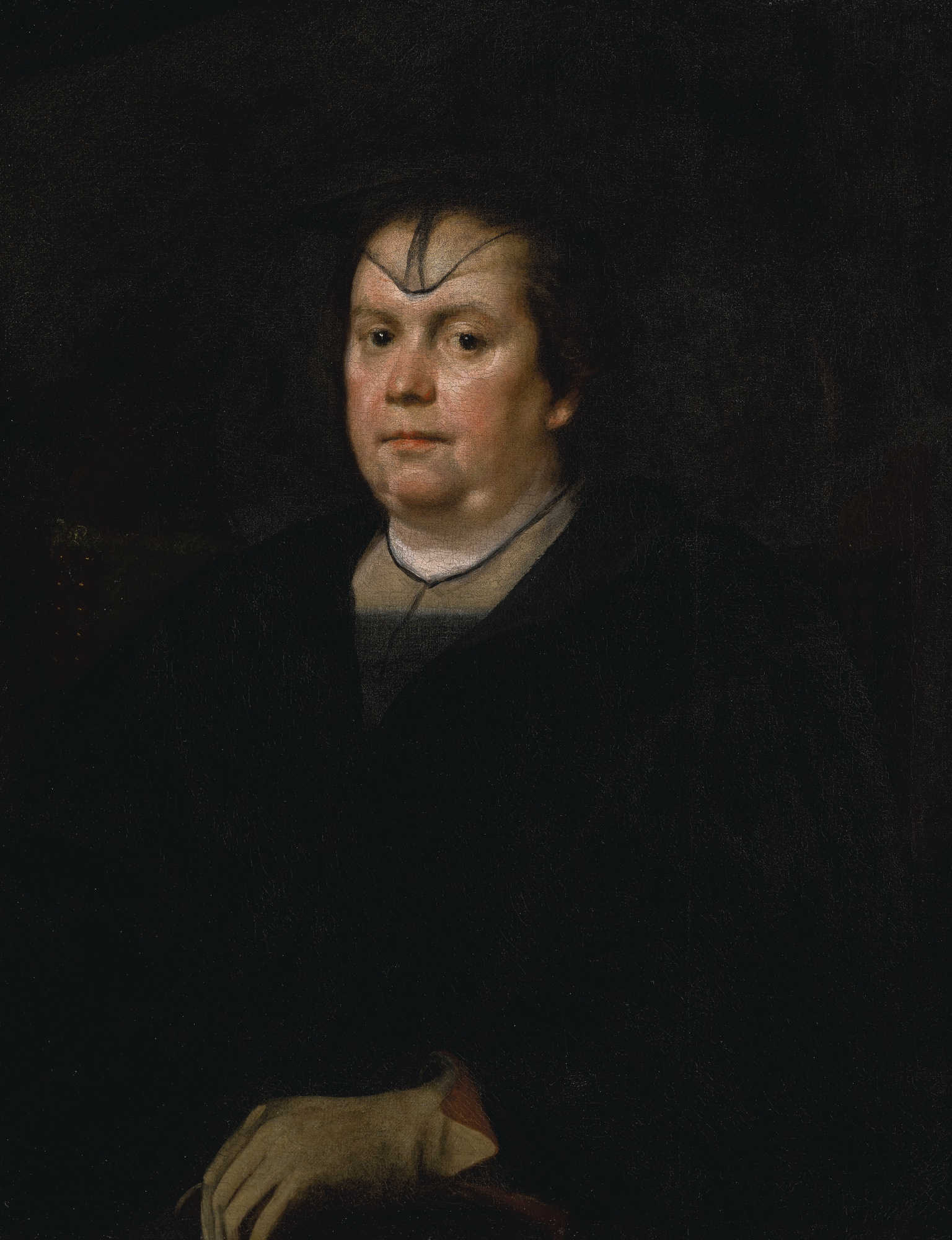 Retrato de Olimpia Maidalchini Pamphilij, óleo sobre lienzo (rayado), 77,4 x 61 cm. Colección particular. Subastado en Sotheby's de Londres el 3 de julio de 2019 con número de lote 28.